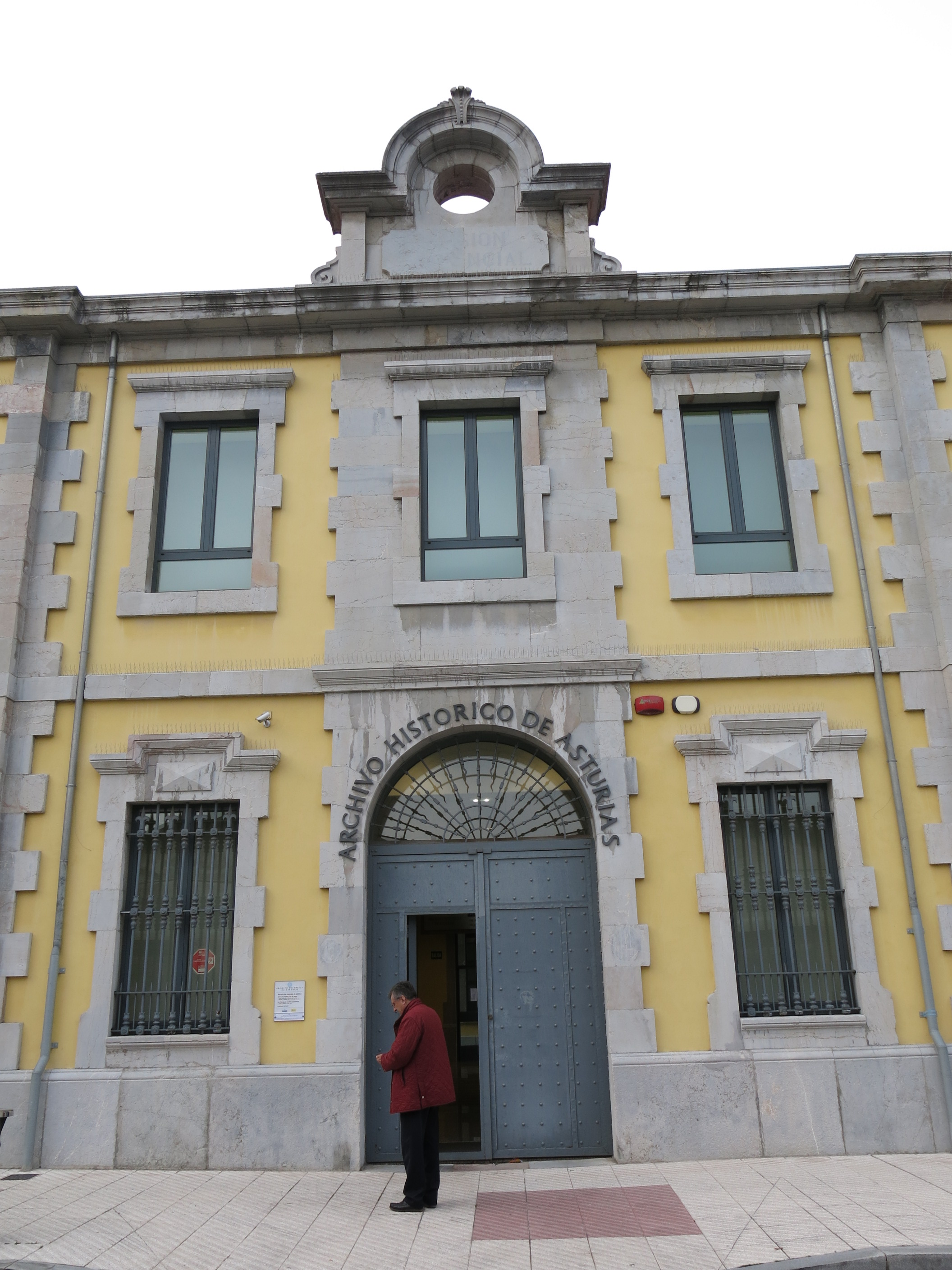 Antigua Cárcel correccional de Oviedo